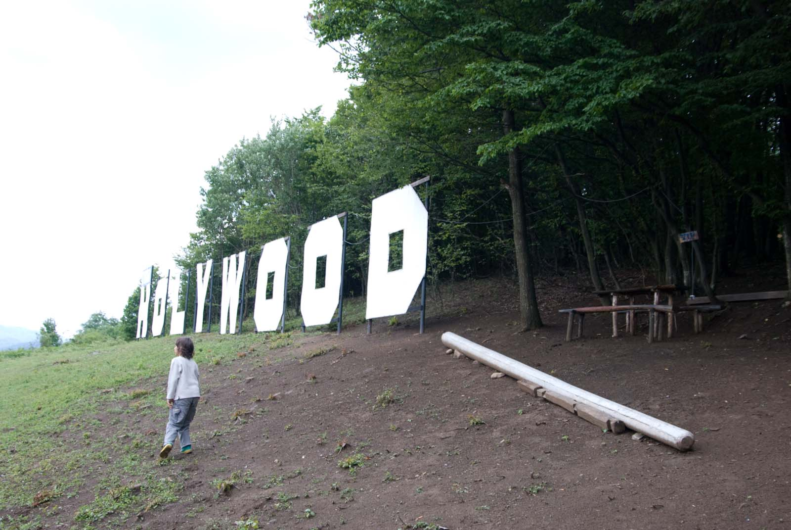 Српски Холивуд у селу Мутањ, снимио Ранко Томић 15.6.2008. Одмах поред се види део плана ДСС: „Бетонска бандера по глави становника“.